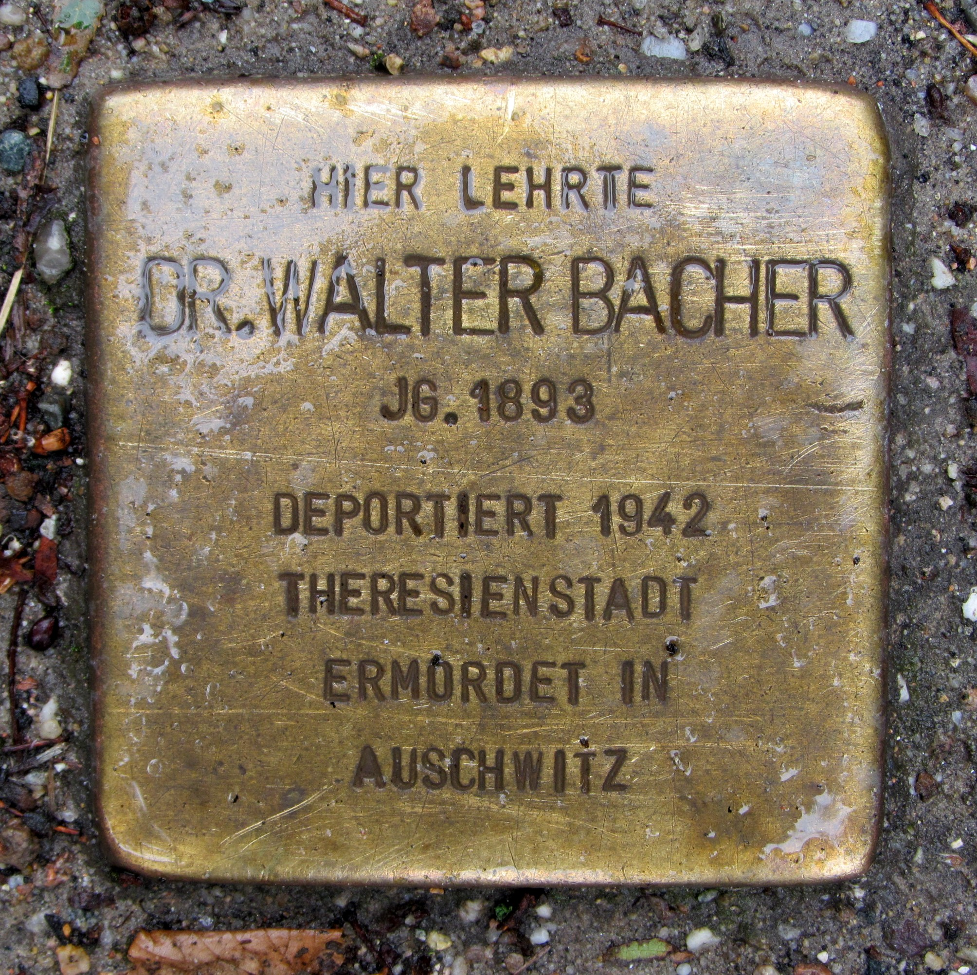 Stolperstein für Walter Bacher in der Einfahrt zum Schulhof des Gymnasiums Klosterschule, Bei der Hauptfeuerwache